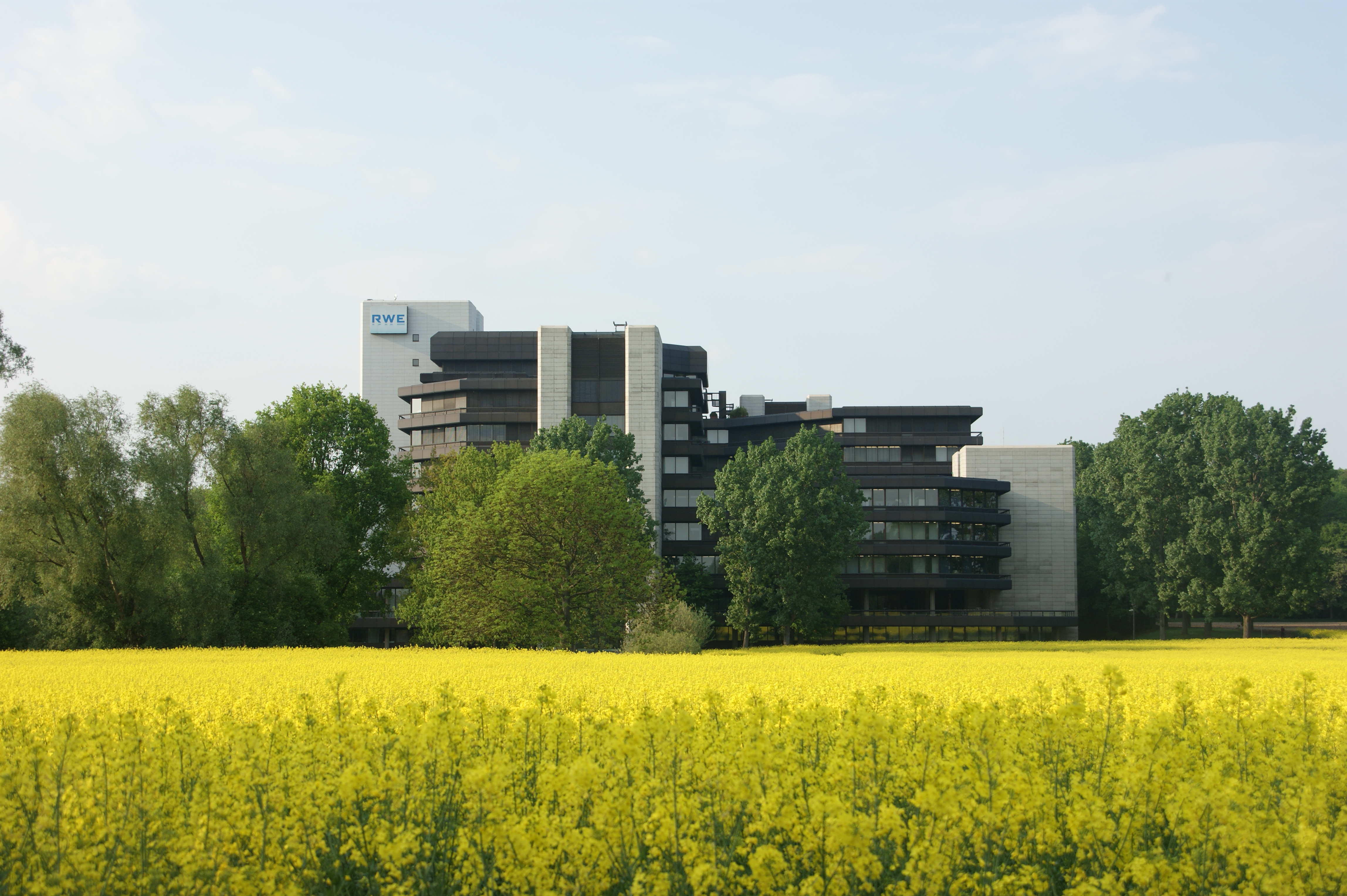 Blick von Süden zum Verwaltungsgebäude RWE Rheinbraun, Kölner Stadtwald, Stüttgenweg 2